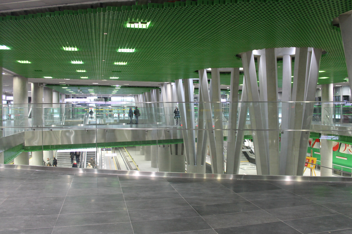 Antresola stacji C14 Stadion Narodowy.